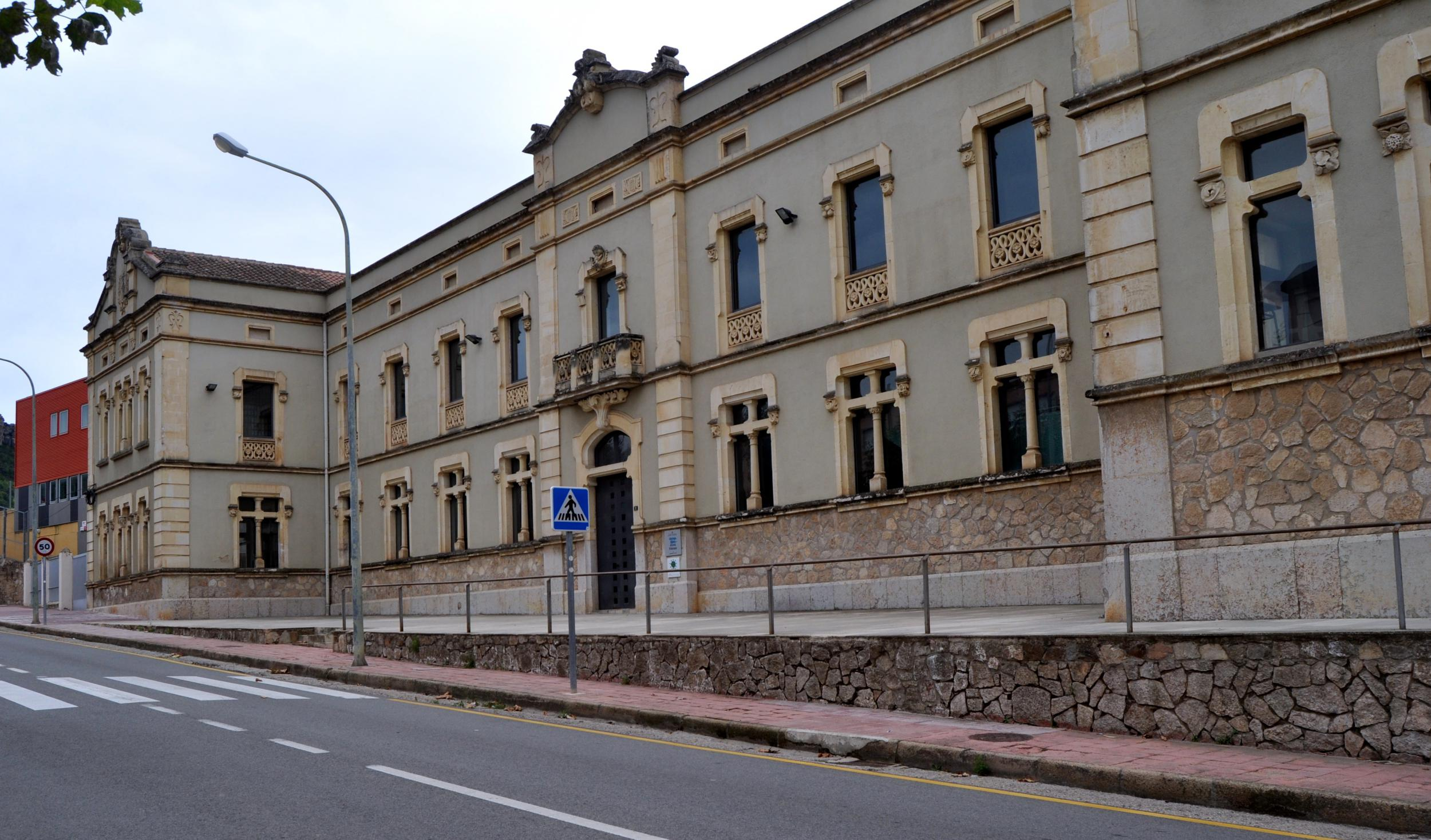 Façana Modernista